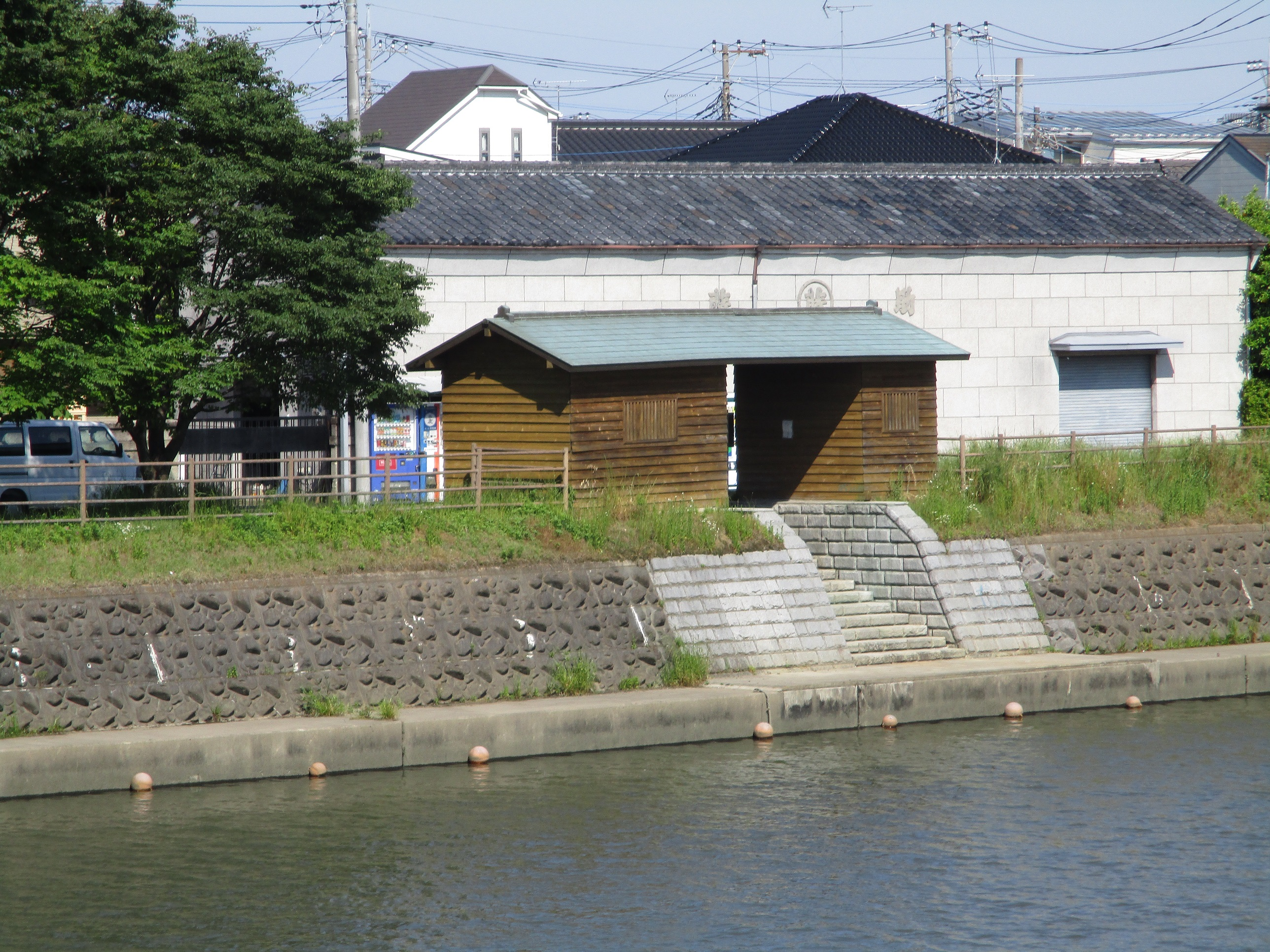 本人による撮影